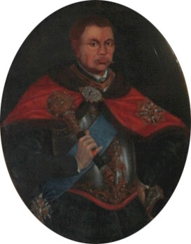 Беларуская (тарашкевіца): Партрэт Людвіка Канстантына Пацея (Ludvik Kanstantyn Paciej)